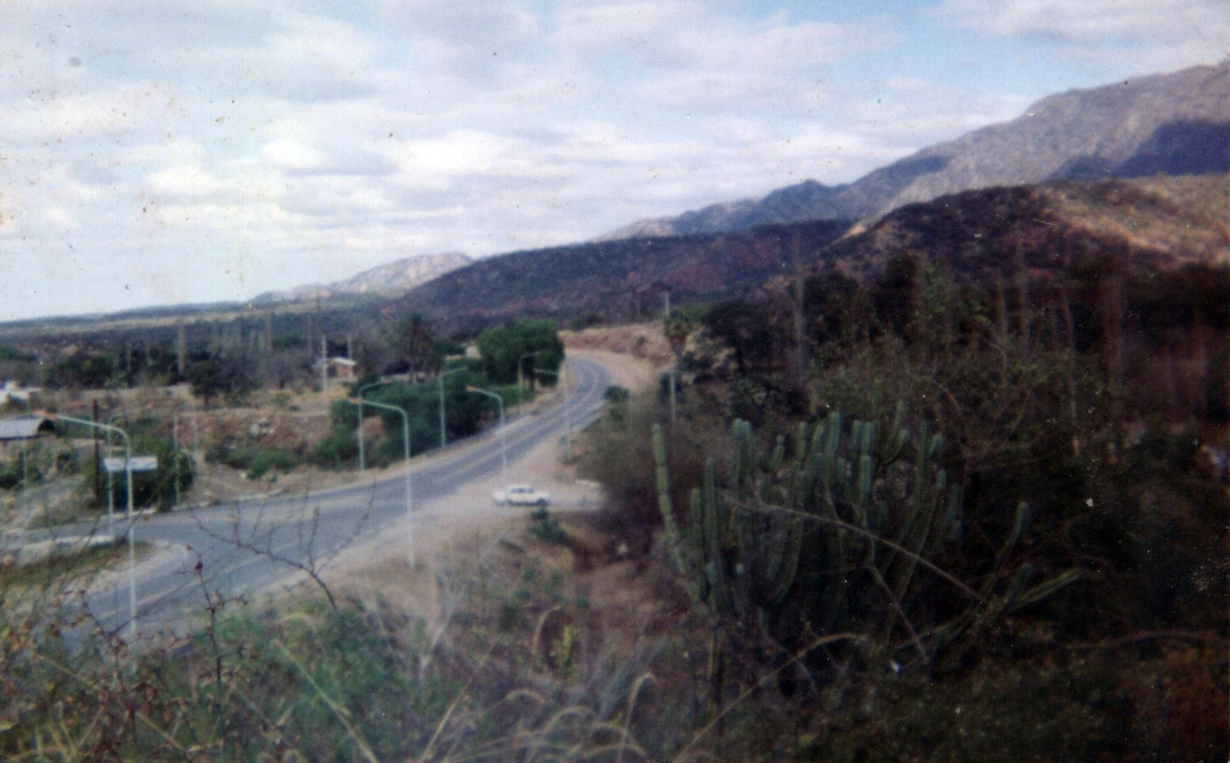 Desde el Alto, la ruta 79 y la entrada a Olta, provincia de La Rioja